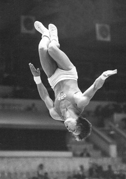 Ralph-Peter Hemmann ADN-ZB Kluge 30.11.80 Japan: Der Leipziger Ralph-Peter Hemmann (Foto von einem früheren Wettkampf) gewann beim Chunichi-Cup im Turnen in Nagoya die Goldmedaille im Pferdsprung.